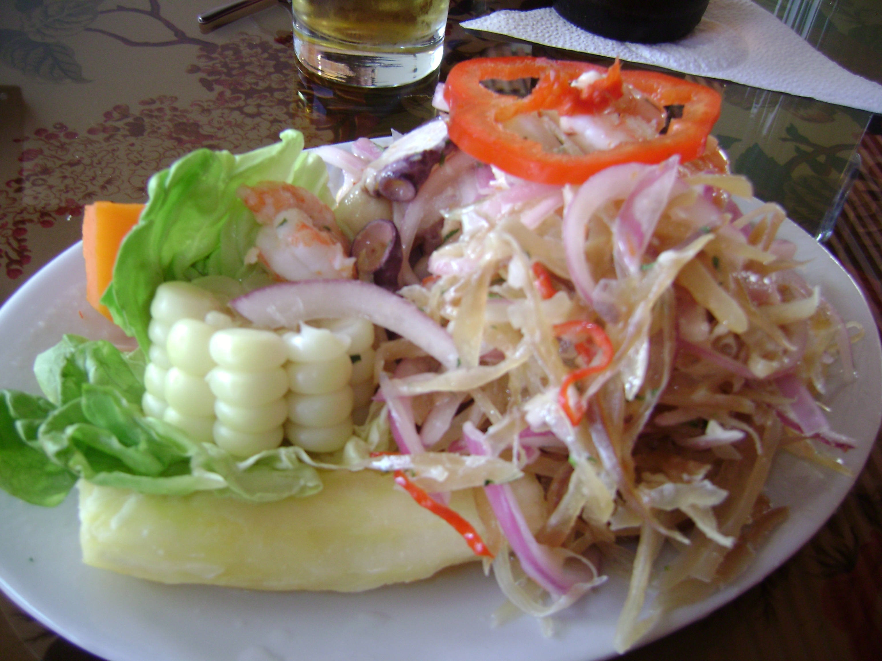 Un plato de "chinguimixto", consistente en media porción de chinguirito (ceviche del pez 'guitarra') y media porción de ceviche mixto de mariscos; Se acompaña con yuca,camote, una hoja de lechuga y una rodaja de rocoto. Lima, Perú.